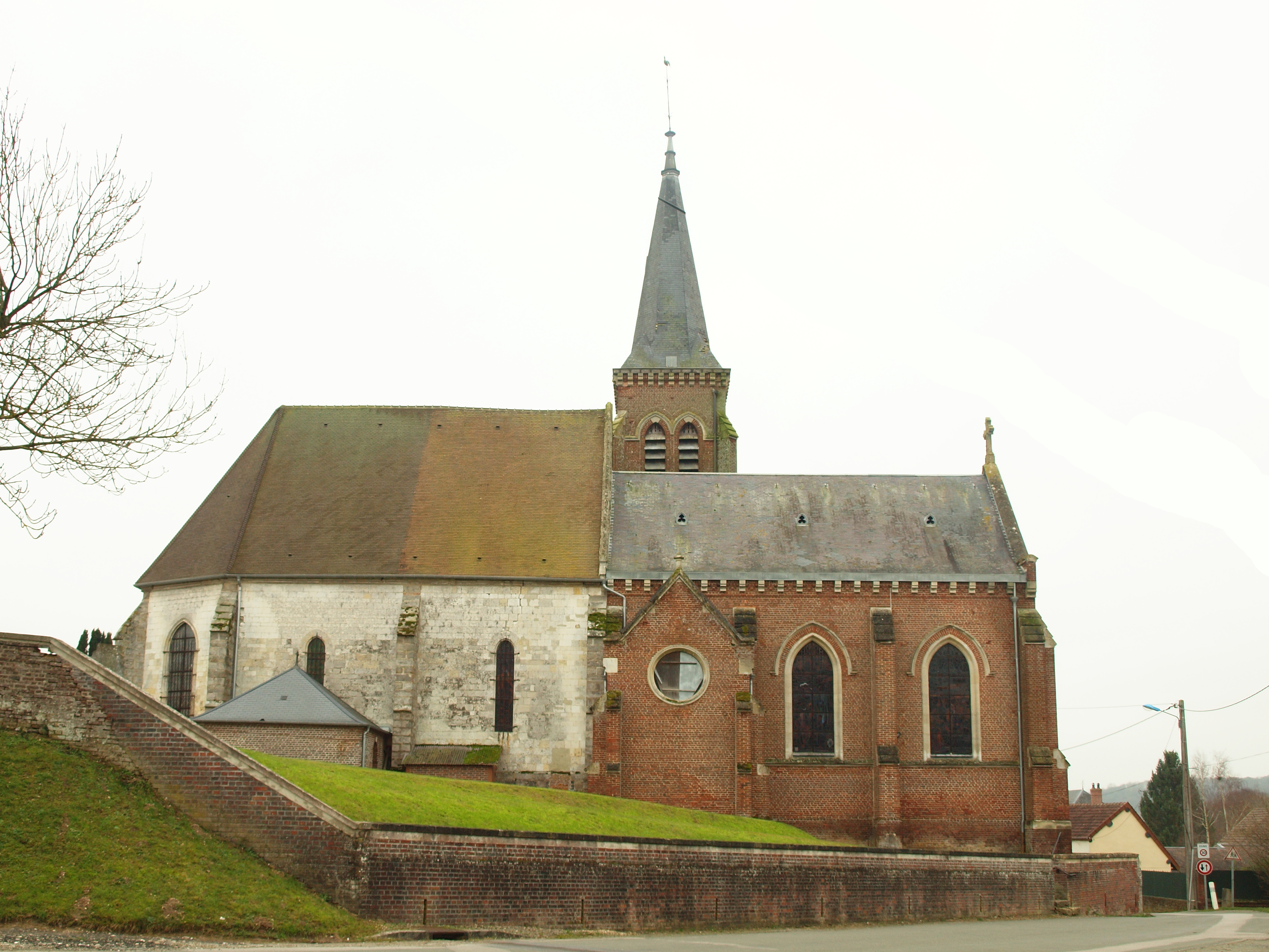 Milly-sur-Thérain (Oisr, France)